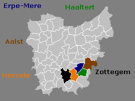 Kaart van het stroomgebied van de Molenbeek